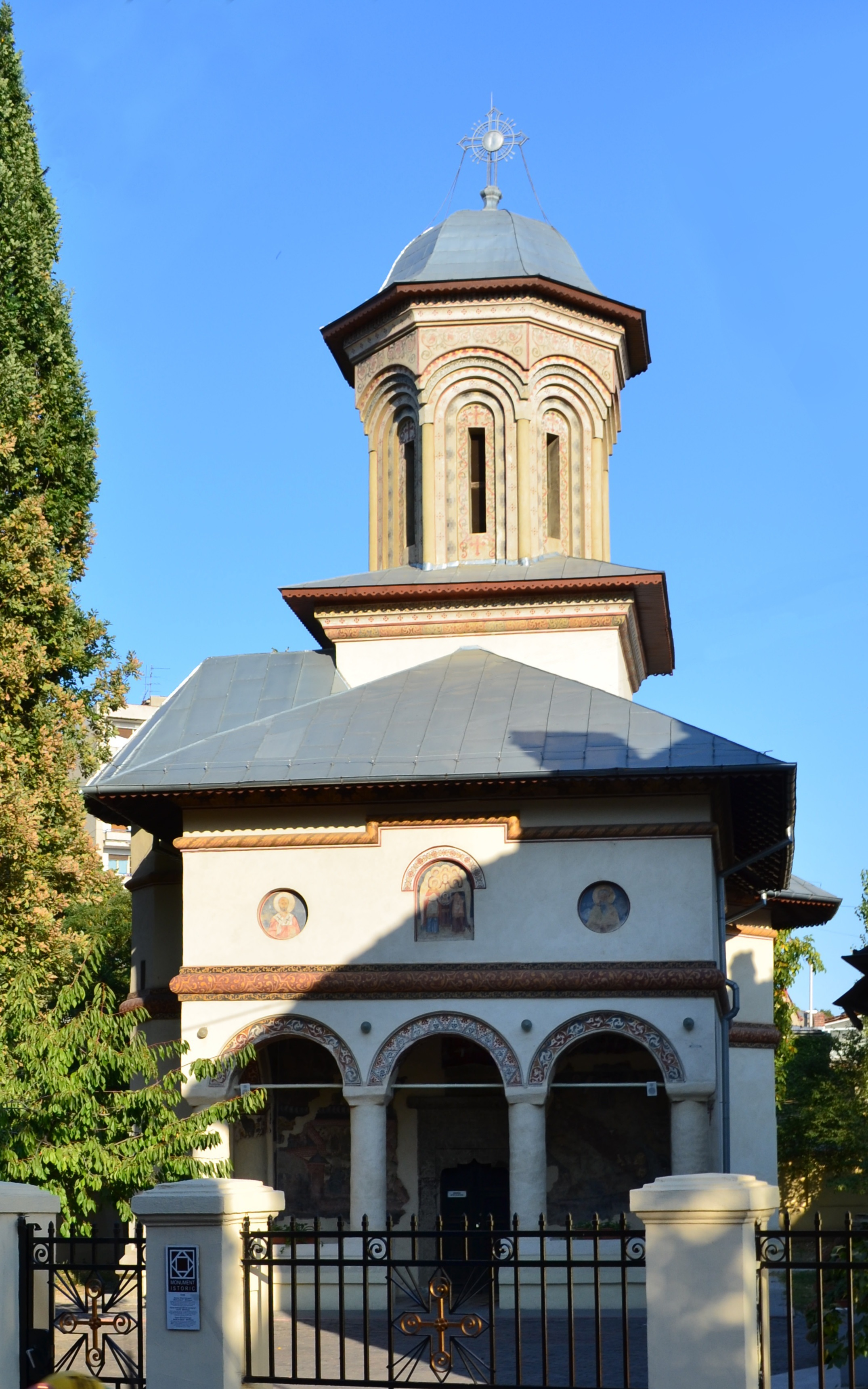 Biserica Mântuleasa, cu hramul "Sfinții Arhangheli Mihail și Gavril". Strada Mântuleasa nr. 20, sector 2, București 01